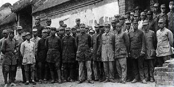 1944年6月至9月，罗荣桓与参加山东军区军事工作会议的全体同志合影。一排右一为罗荣桓。